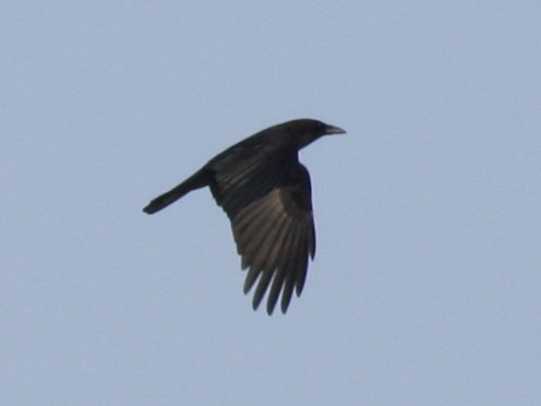 Bild einer Rabenkrähe (Corvus corone) im Flug Autor: Paneros